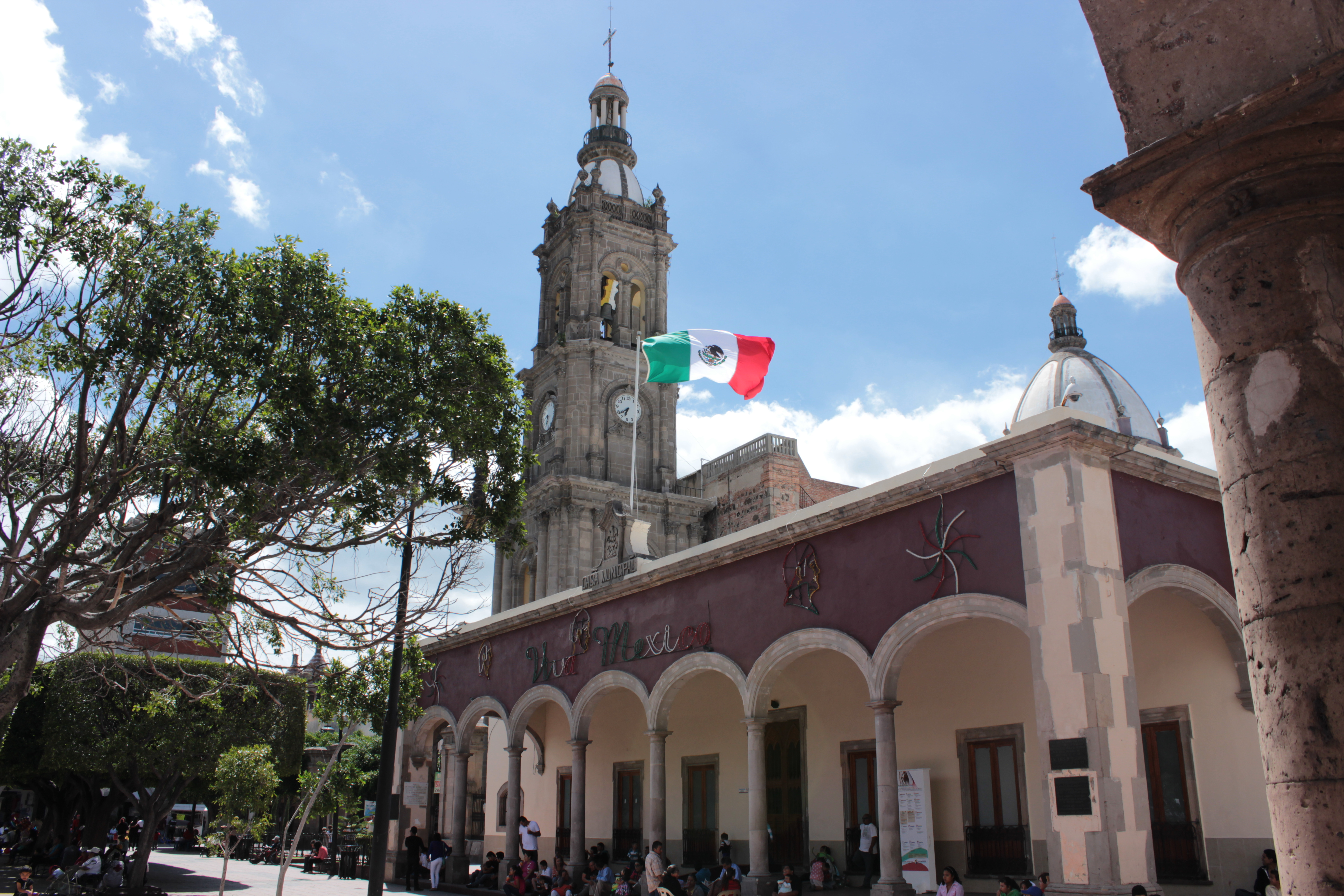 Con mas de 100 años de antiguedad se yergue orgullosa la Casa Municipal en Salamanca, Gto.